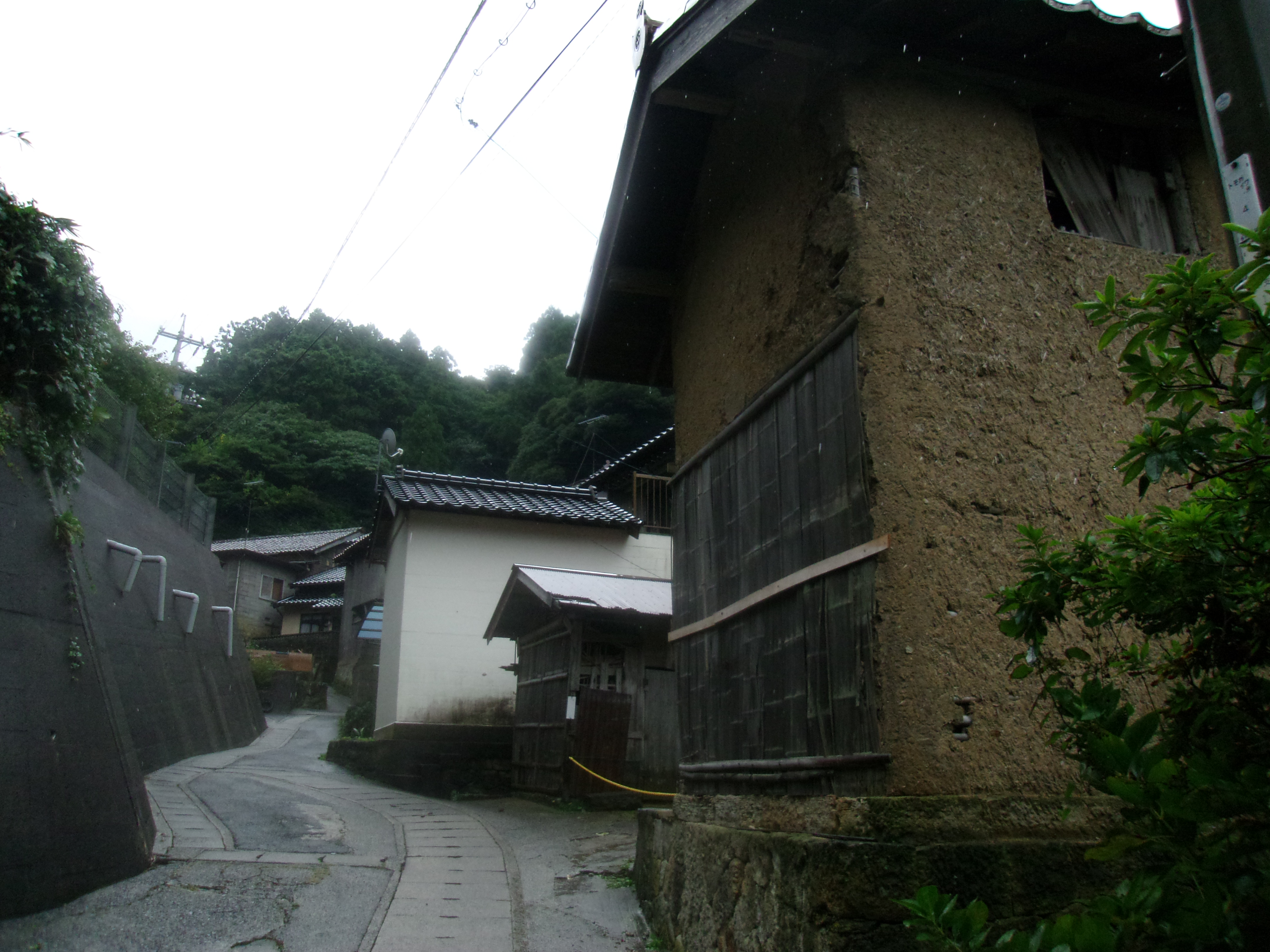 世界遺産「石見銀山」の構成資産である銀山街道鞆ヶ浦道 鞆ヶ浦集落